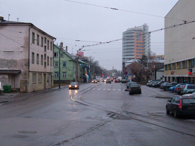 Tondi tänava algus. Vaade Pärnu maantee poole. Tallinn.